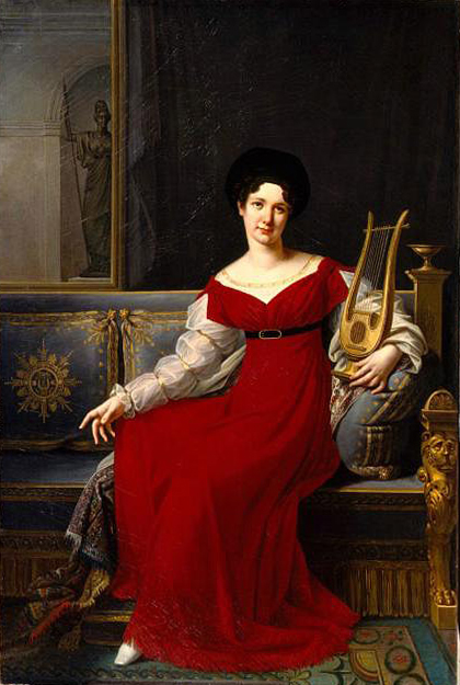 Княгиня Екатерина Васильевна Салтыкова, ур.Долгорукова, (1791-1863), фрейлина, статс-дама.